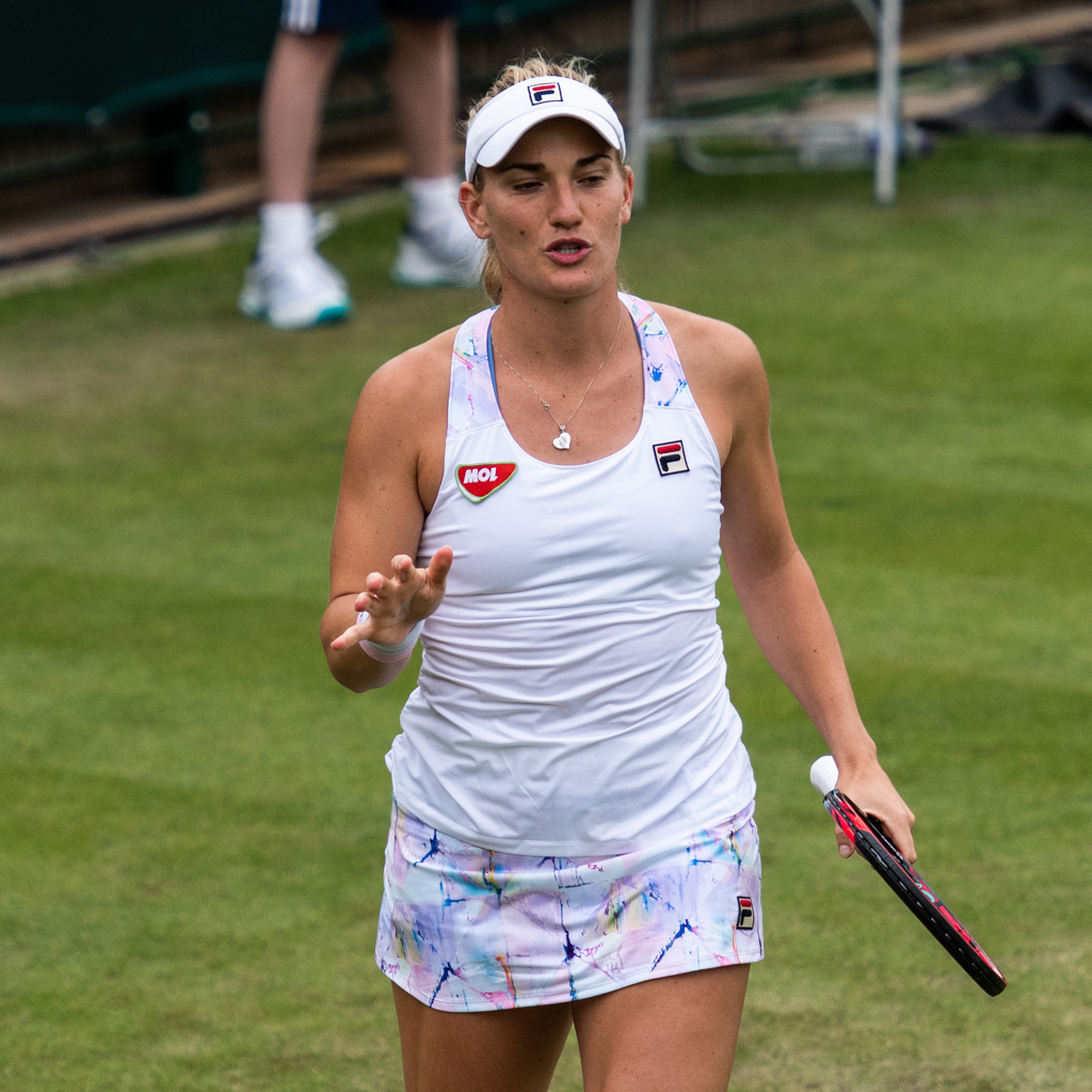 Timea Babos